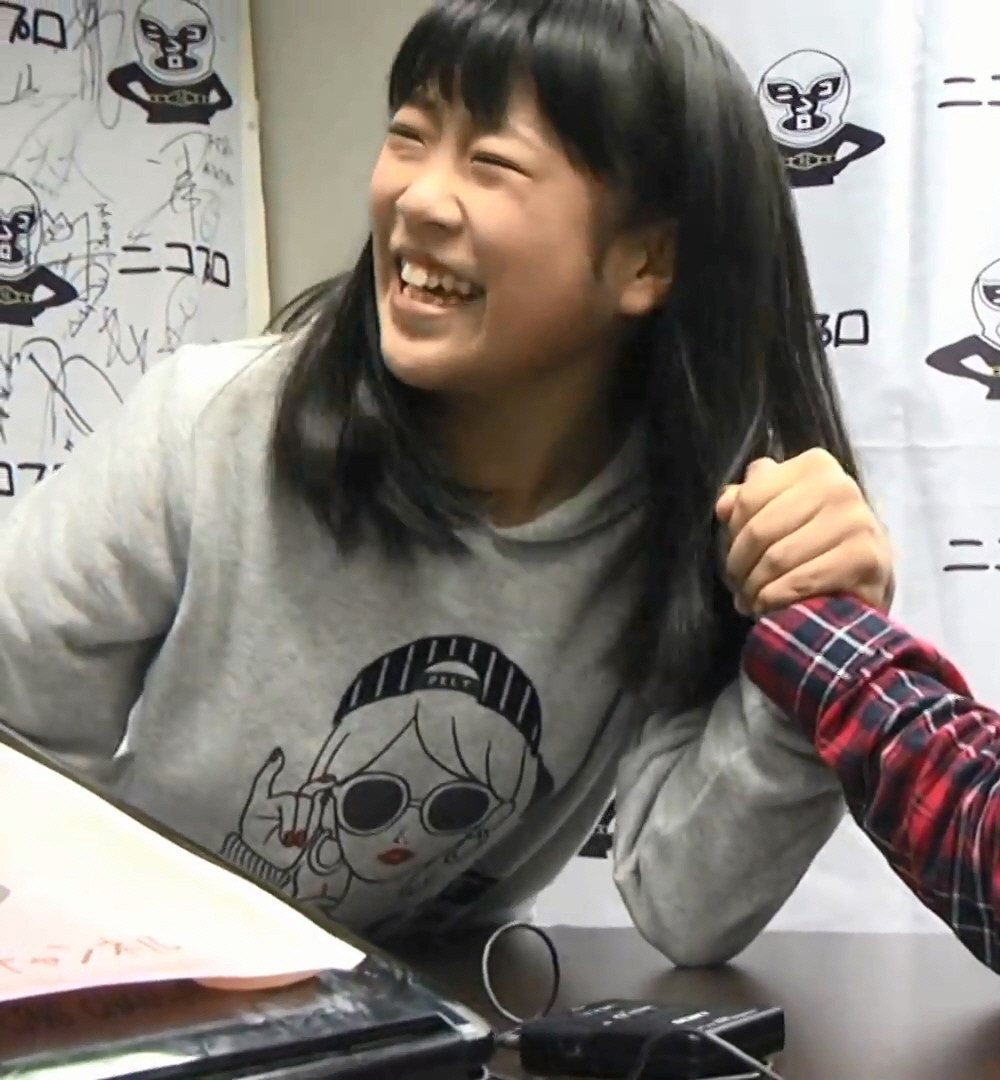 スターダム あずみ選手 七星アリス選手 ルアカ選手の腕相撲対決！